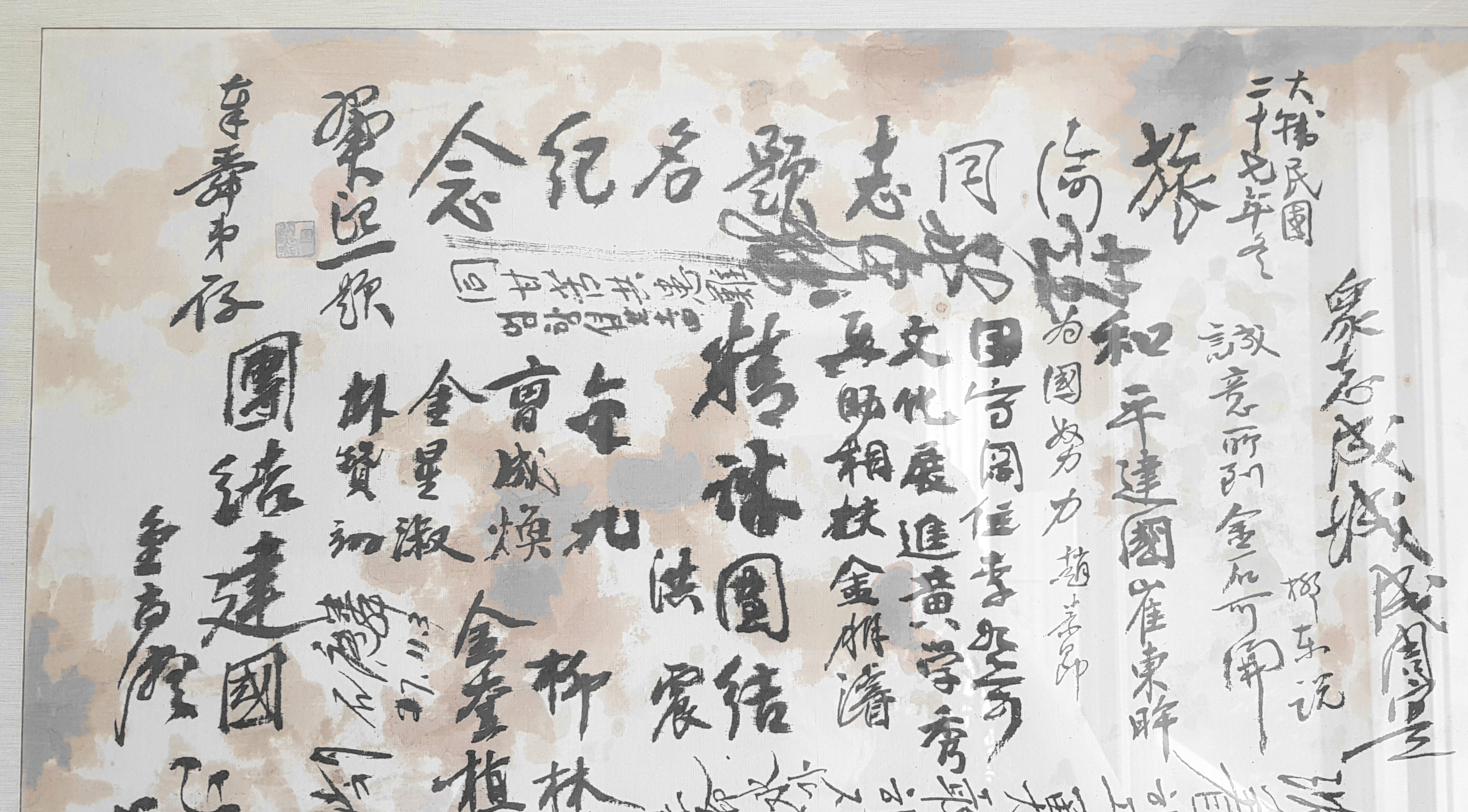 김규식 필체. 해방후 기념서명포